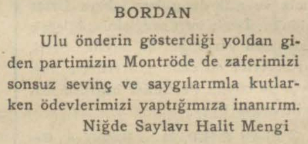 Montrö zaferi üzerine Ulus gazetesine yazdığı 23 Temmuz 1936 tarihli telgraf.